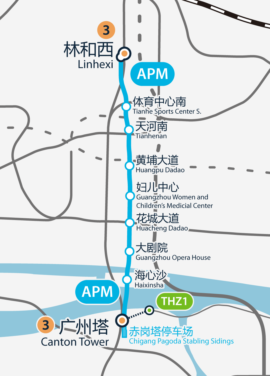 廣州地鐵APM路線圖，按真實走向比例繪畫